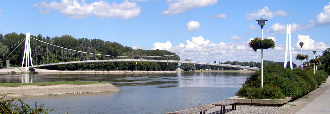 Bridge in Osijek